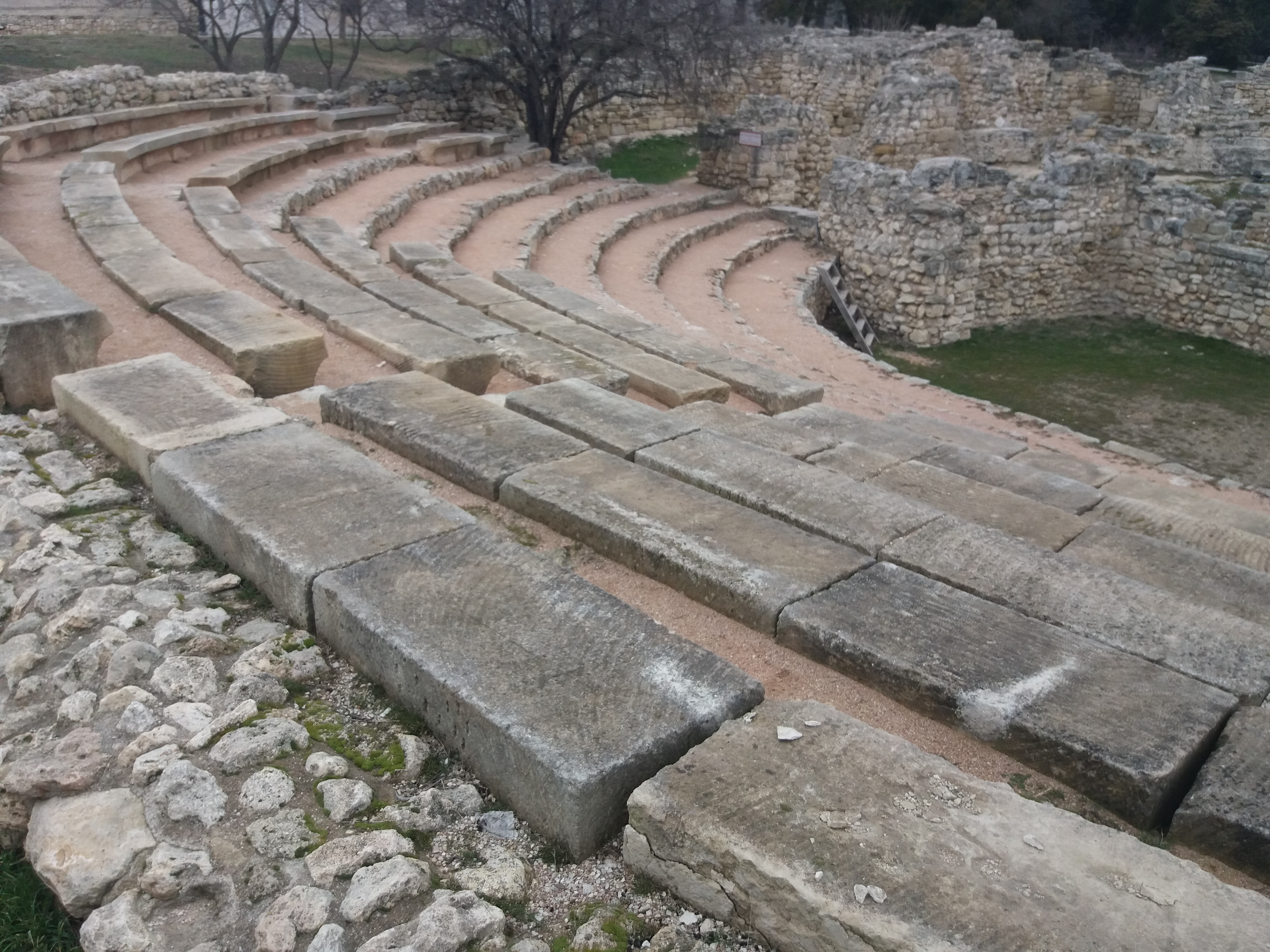 античный театр, Херсонес Таврический